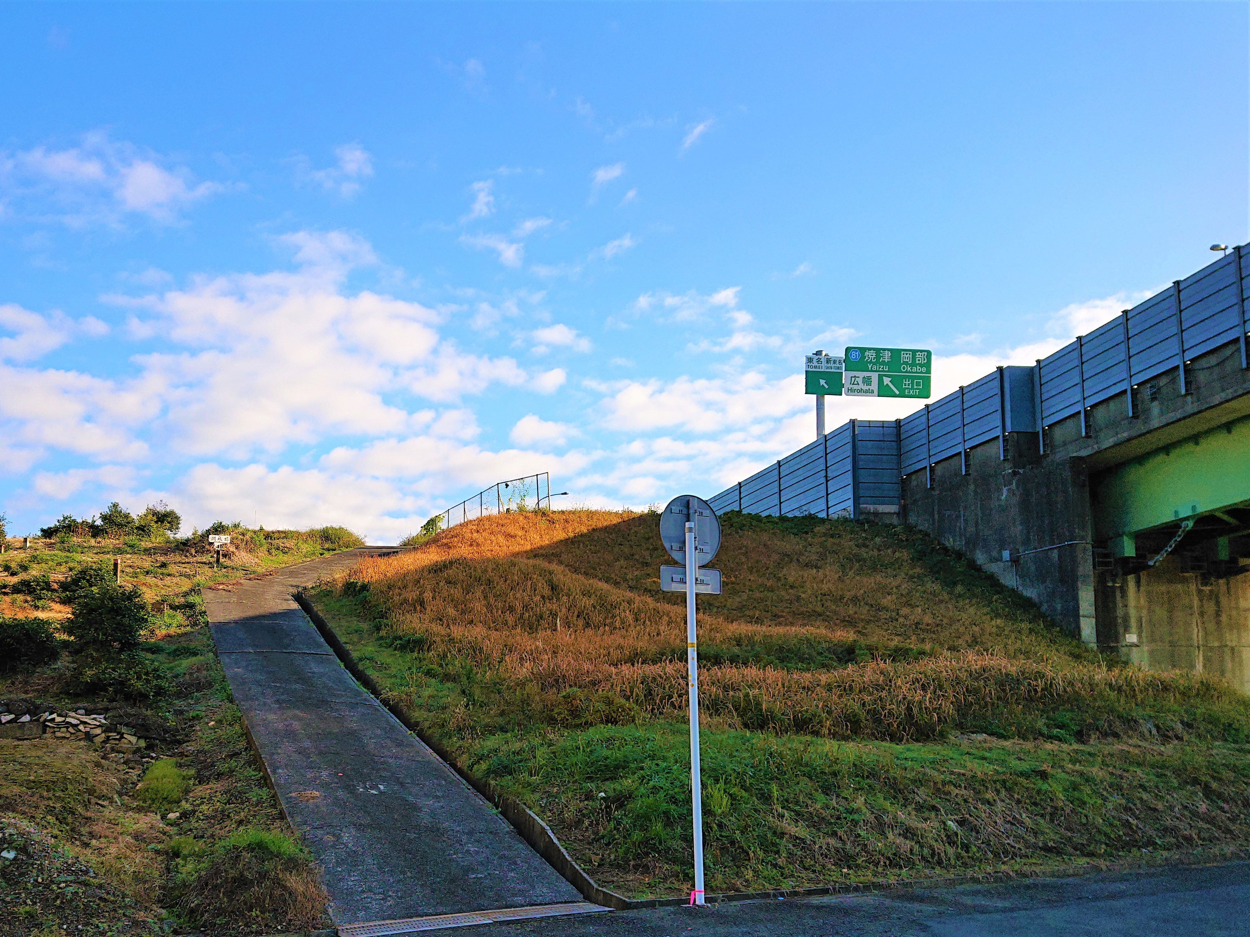 潮城跡。写真右側は国道1号線藤枝バイパス。